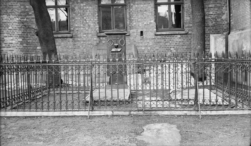 Biskop Nicolai Lumholtz gravsted utenfor Oslo domkirke fotografert av Fritz Holland i 1937. Tilhører Oslo Museum